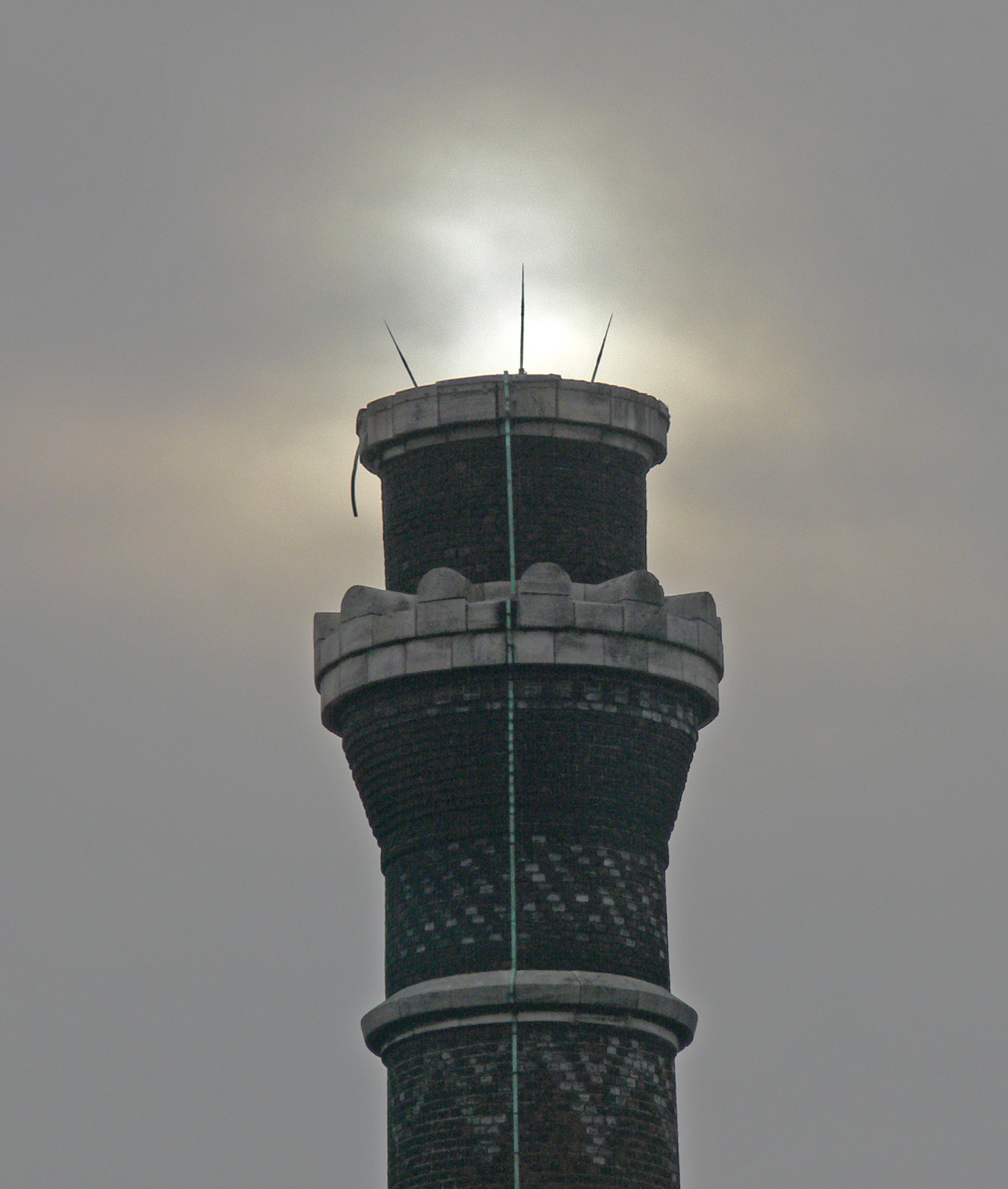 Cheminée et son paratonnerre de cuivre (Ecole Nationale Supérieure des Arts et Métiers, ENSAM, à Lille, dans le nord de la France